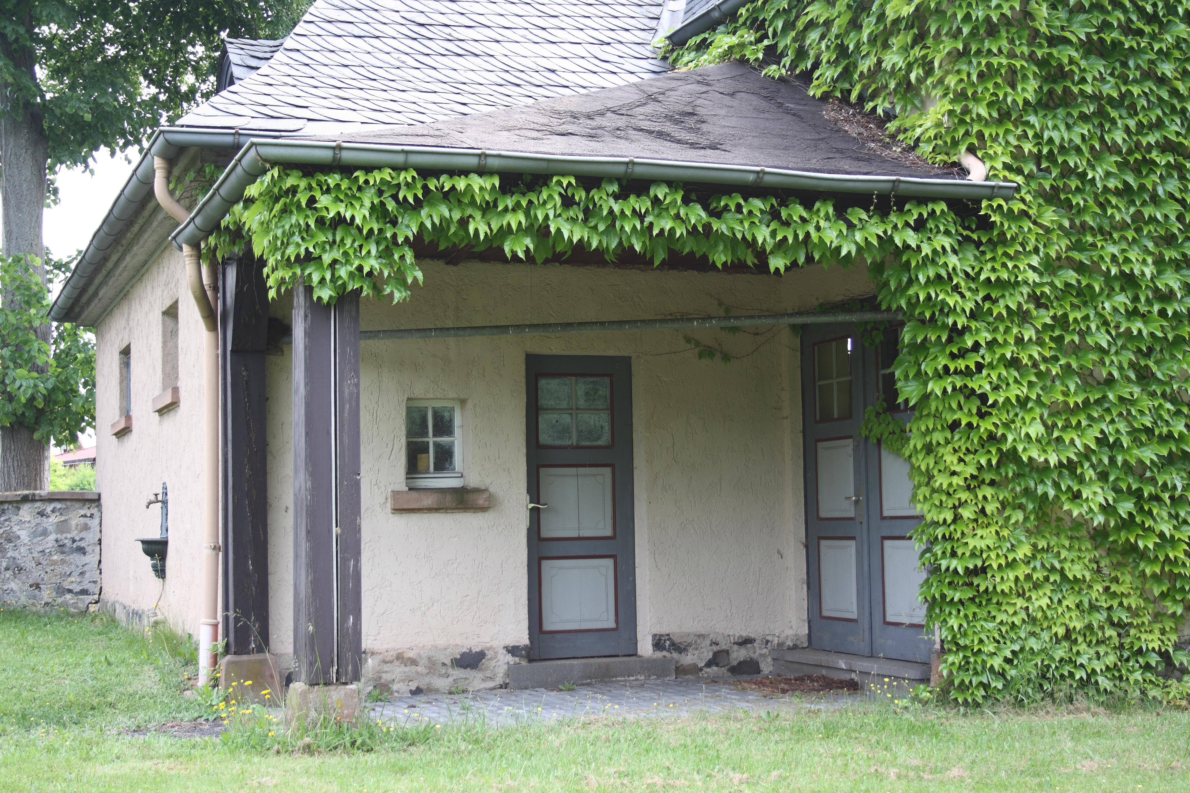 Jüdischer Friedhof mit jüdischem Teil der Leichenhalle in Alsfeld im Vogelsbergkreis (Hessen), Auf dem Frauenberg